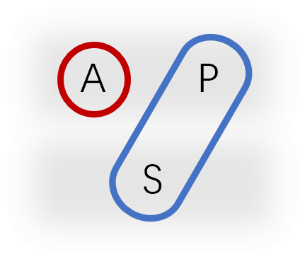 中文（中国大陆）: 句法形态配列，SP-A